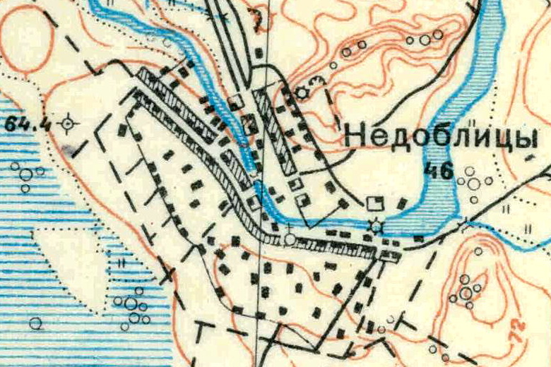 Топографическая карта Ленинградской области, квадрат О-35-22-Г-г (Торма), деревня Недоблицы.